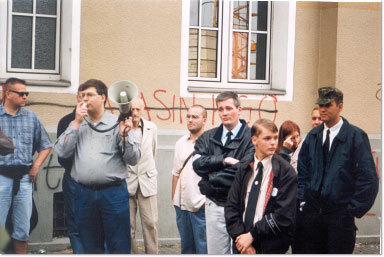 Pro Köln-Vorsitzender Manfred Rouhs (mit Megafon) sowie Axel Reitz (2. v.r. vorne)